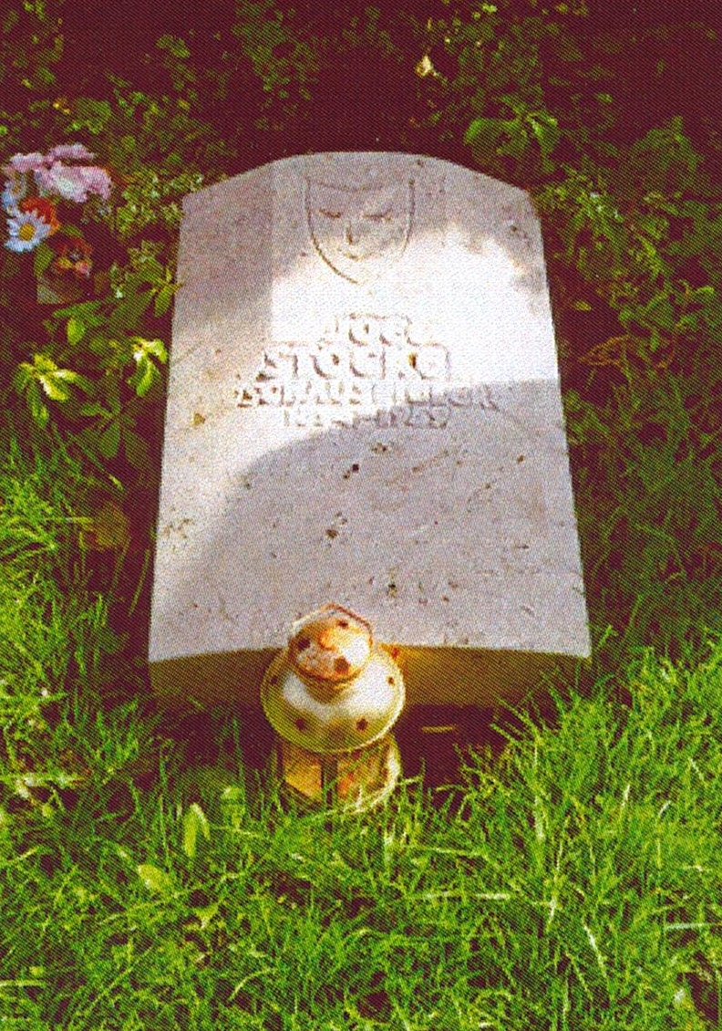 Ostfriedhof München-Joe Stöckel